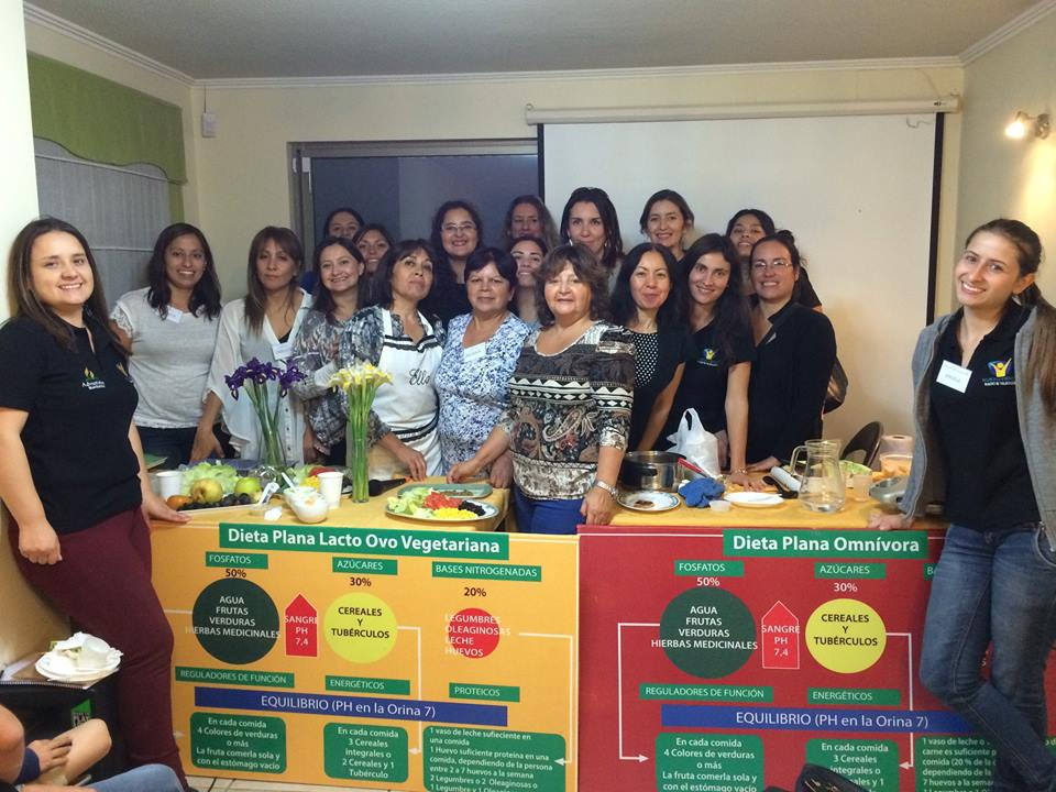 Esta comunidad esta compuesta por familias del sector y desarrollan programas tendientes a mejorar la calidad de la vida de las personas.